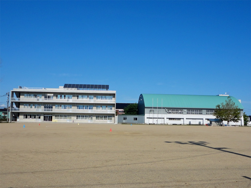 滑川市立田中小学校全景